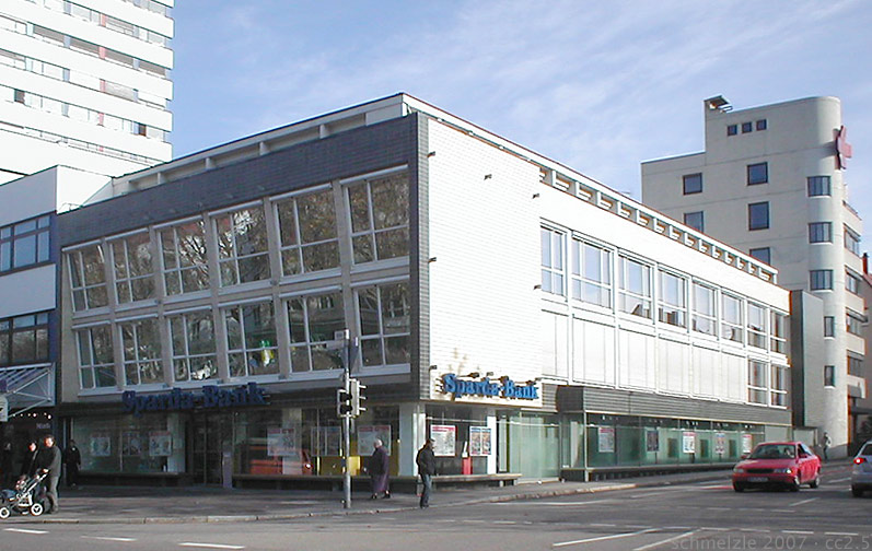 Ehemaliges Möbelhaus Kost (heute Sparda-Bank) an der Allee 36 in Heilbronn. Das Gebäude ist aufgrund seiner typischen Architektur der 1950er Jahre denkmalgeschützt.